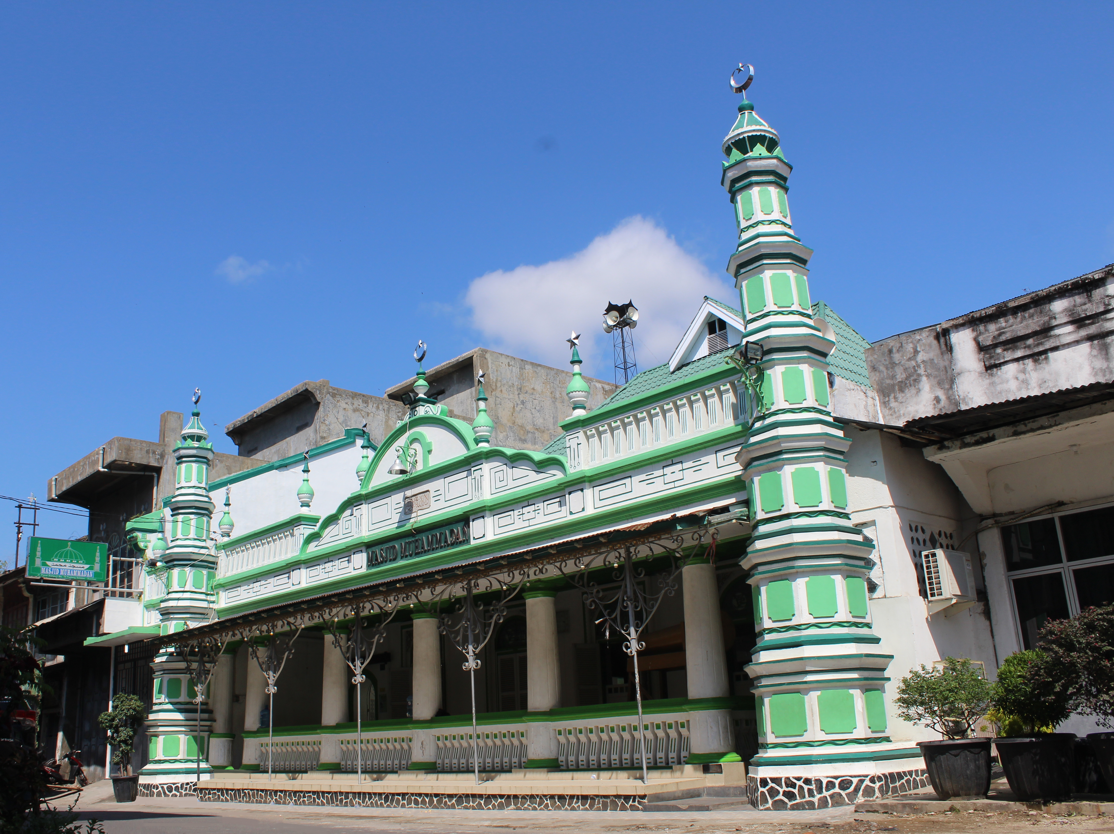 Masjid Muhammadan di Kota Padang, Sumatra Barat, Indonesia